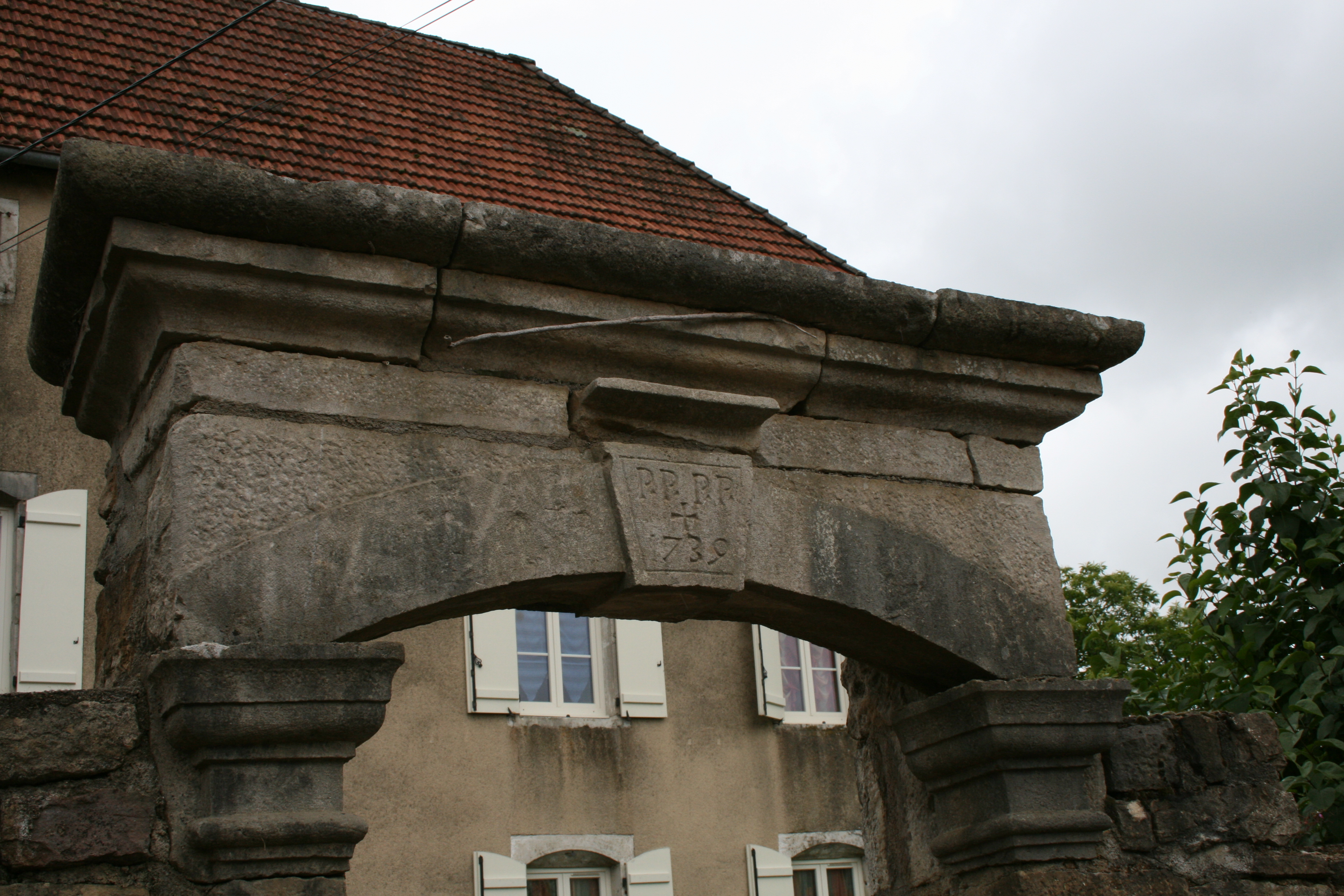 Cerre-lès-Noroy (Haute-Saône) linteau de la maison dite "le Château"